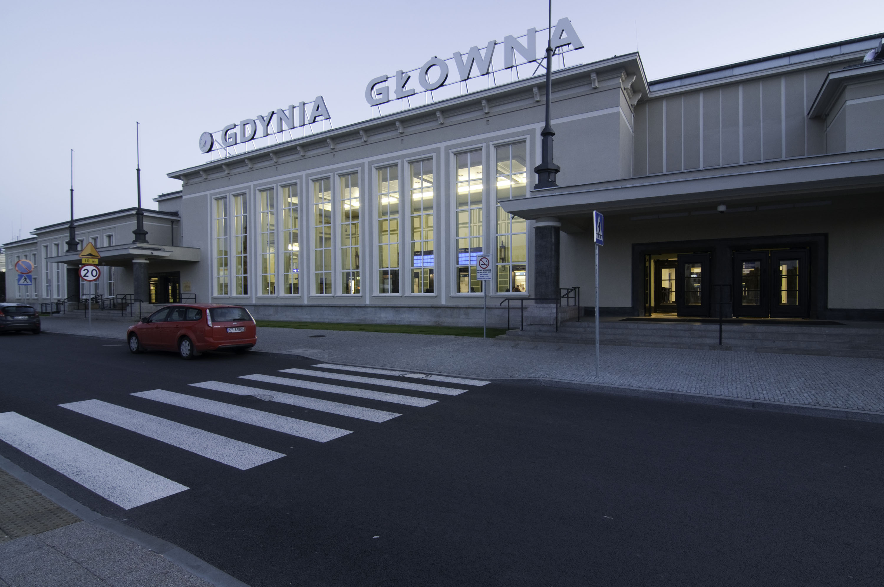 Zespół dworca kolejowego, widok od Placu Konstytucji.